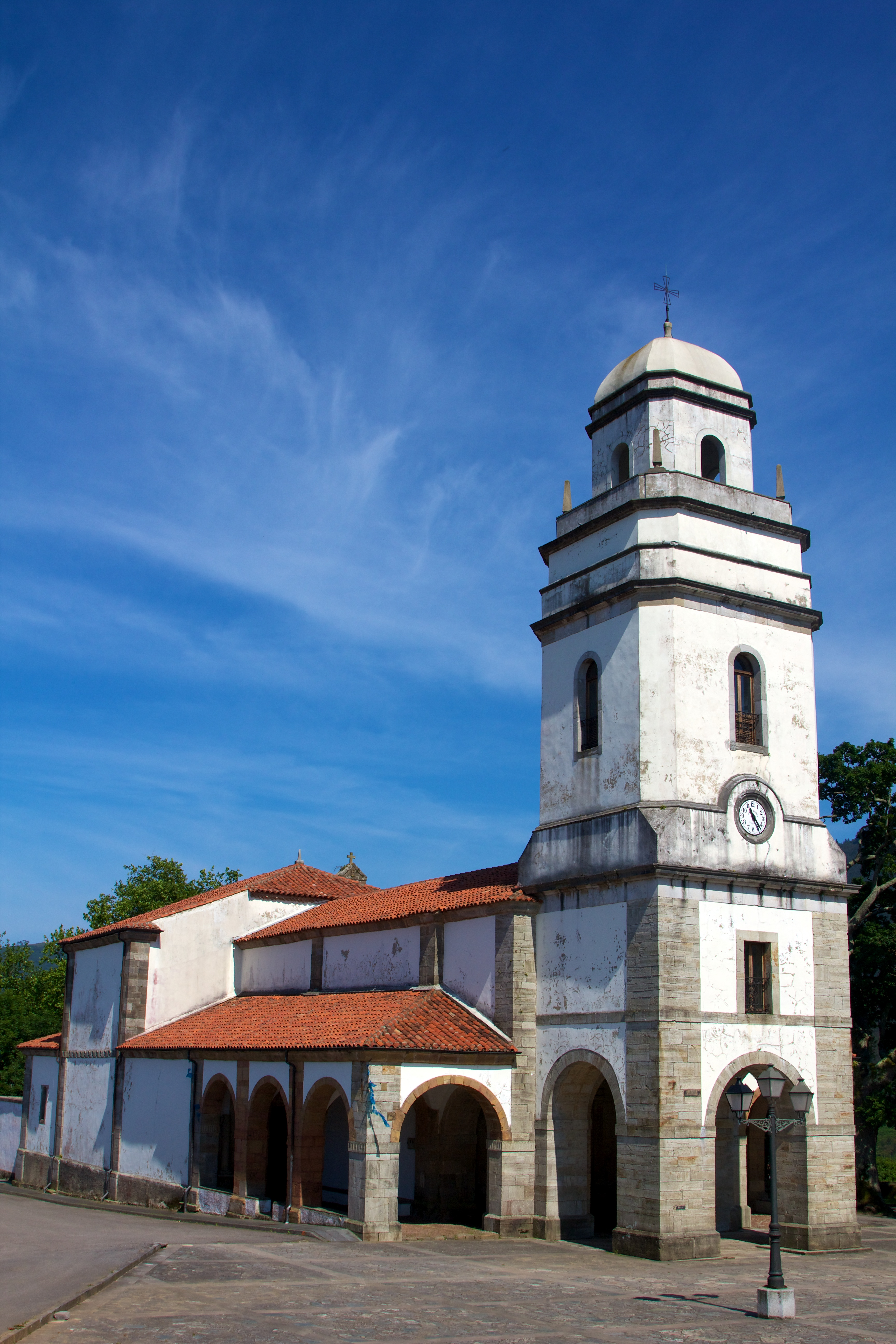 Iglesia de San Martín de Luiña en el concejo de Cudillero en Asturias, España.